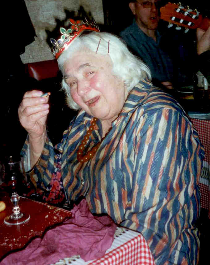 L'actrice de cinéma Esther GORINTIN photographiée au restaurant "Au p'tit bonheur" à Paris, 12 rue Thouin, au cours d'un "repas-chansong" de la Compagnie Carnavalesque Parisienne "Les Fumantes de Pantruche" dont elle était adhérente.